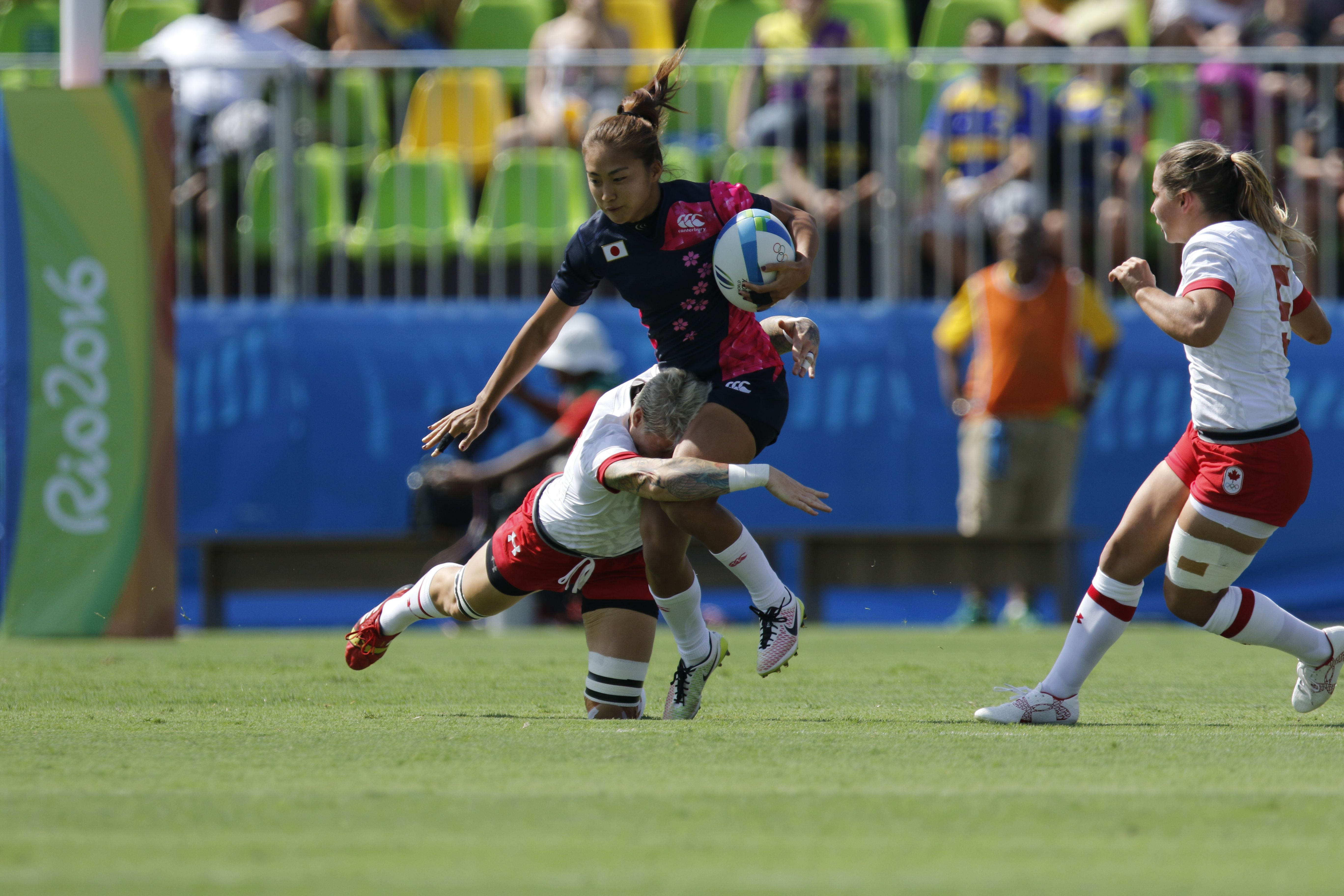 Rugby feminino: Canadá vence Japão por 45 a 0